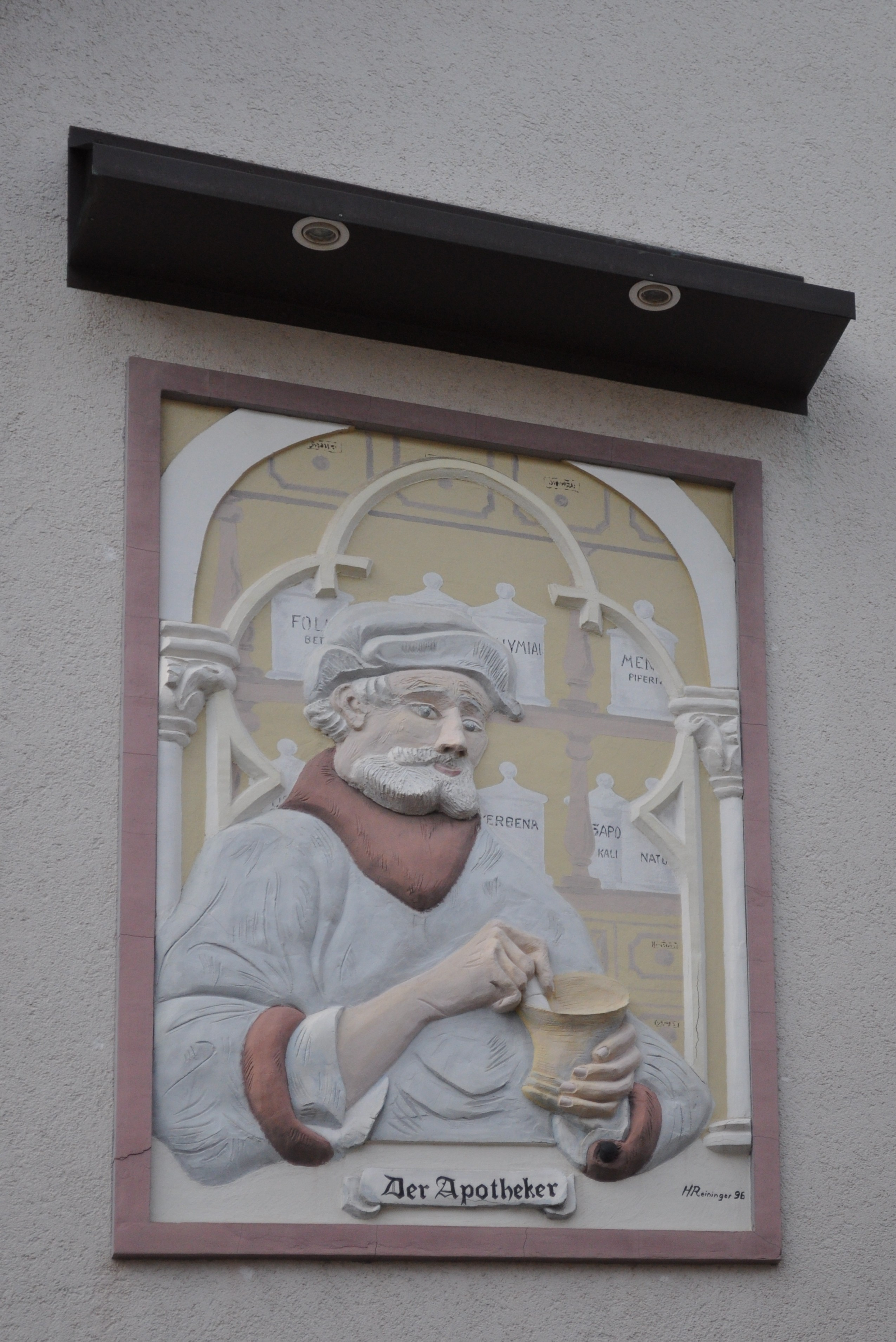 Wandbild "Der Apotheker" an der Löwen-Apotheke in Niederhöchstadt